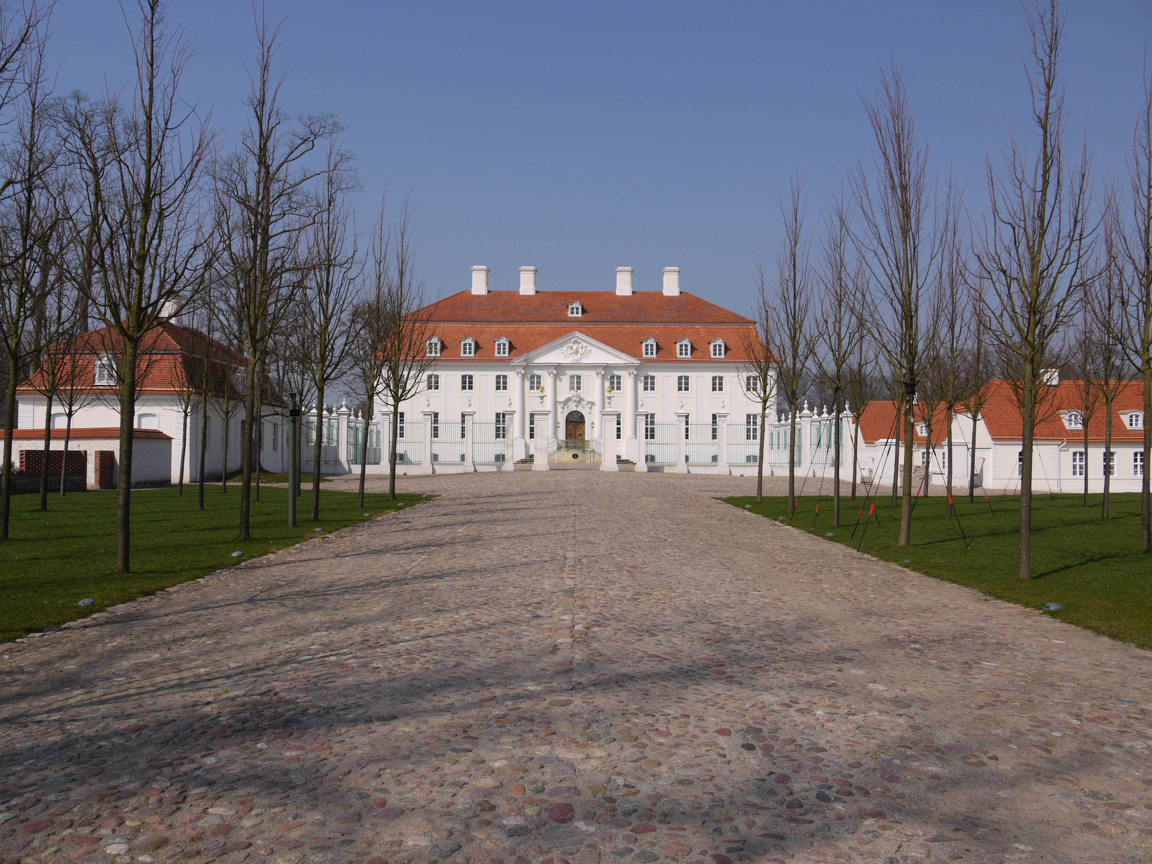 Schloß Meseberg Gästehaus der Bundesregierung